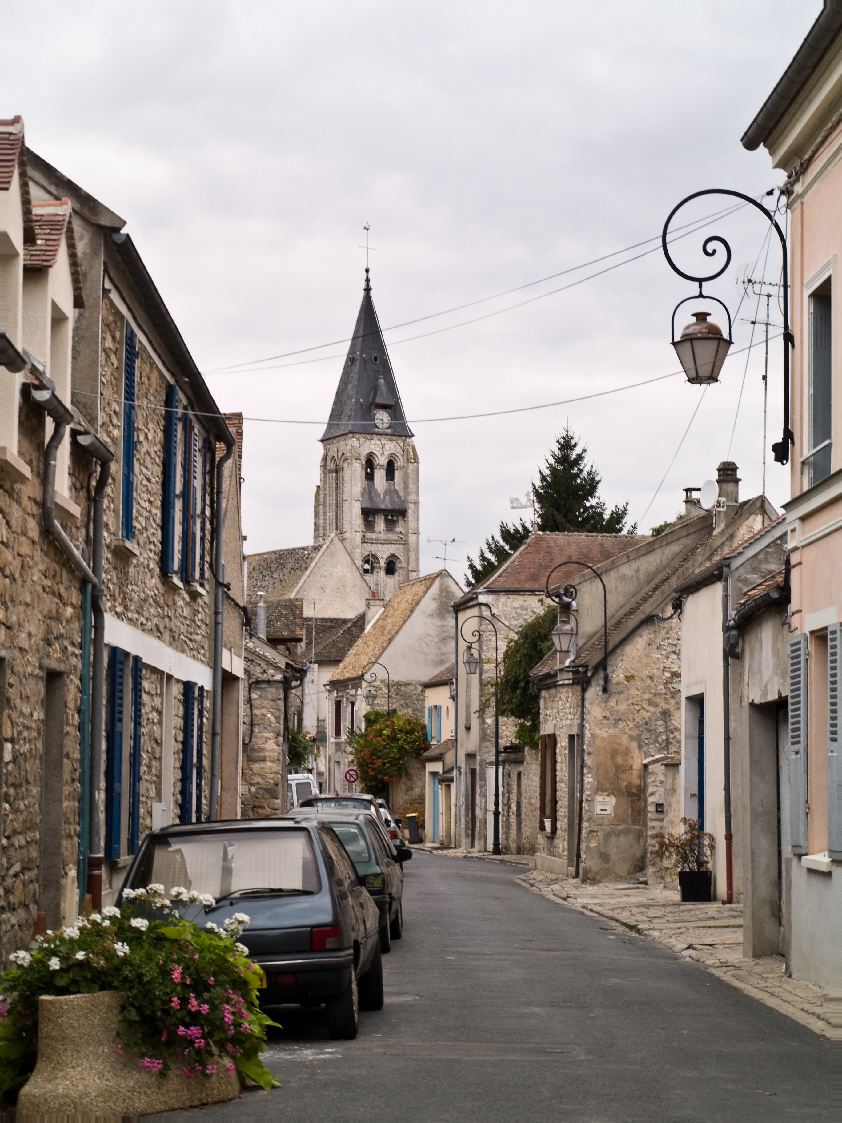 Milly-la-Forêt (Essone, France) - La rue des Trois Môles avec, en arrière-plan, la flèche de la collégiale Notre-Dame-de-l'Assomption